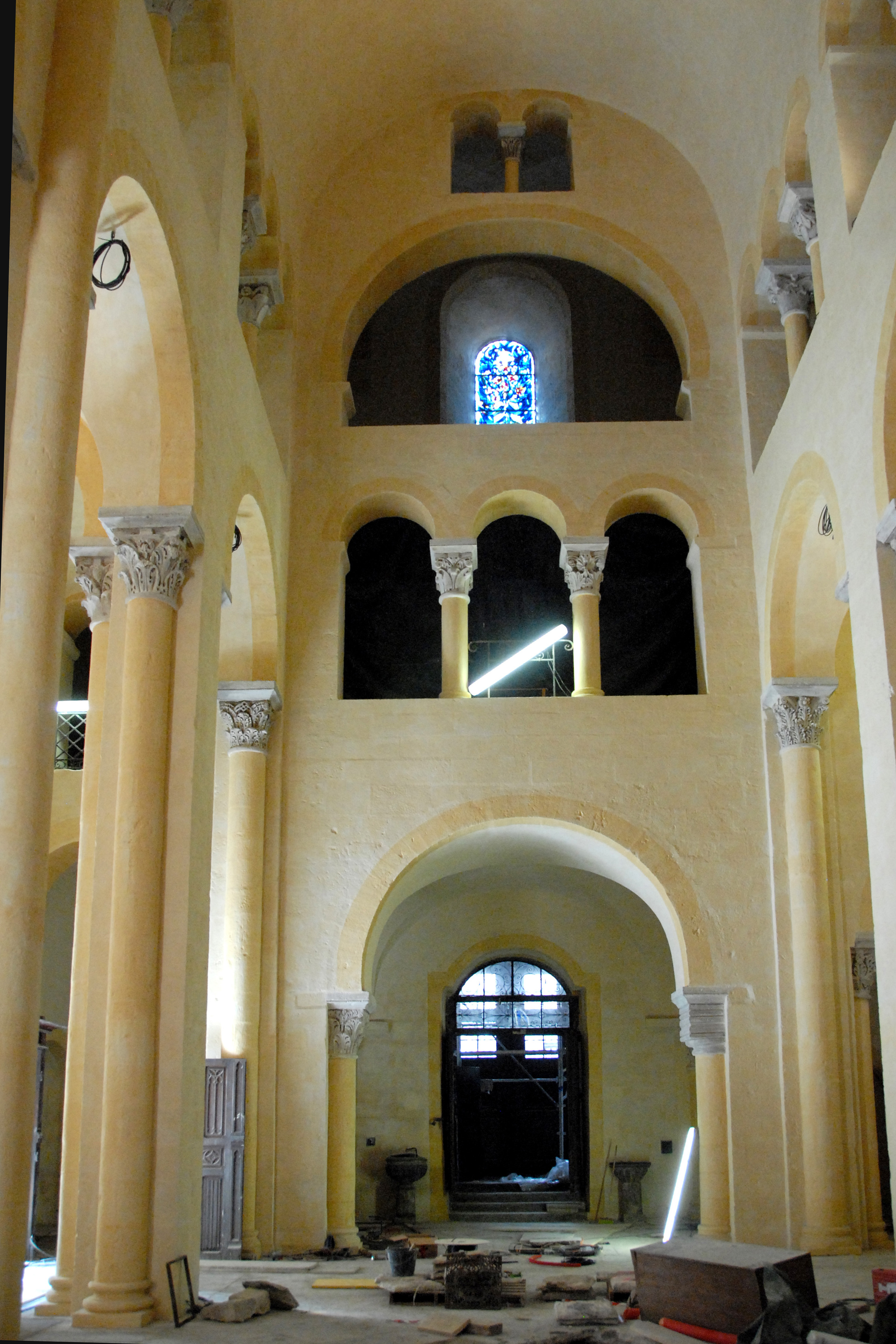 Notre-Dame du Port, Wand zum Narthex